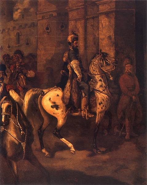 Czarniecki na tarancie. 1862. Szczochy na płótnie. Własność prywatna.